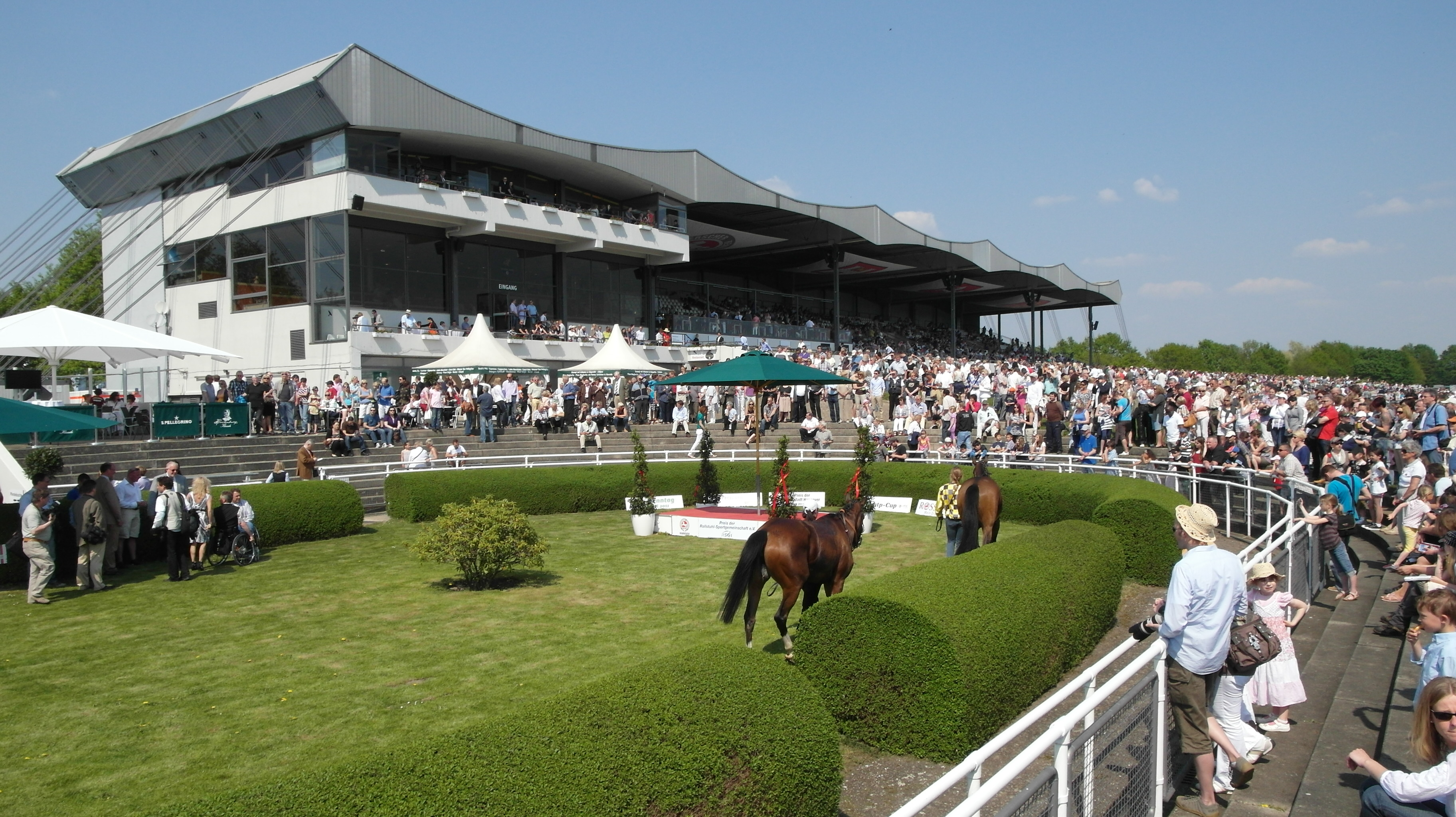 Galopprennbahn Neue Bult in Langenhagen. Im Vordergrund der Absattelring